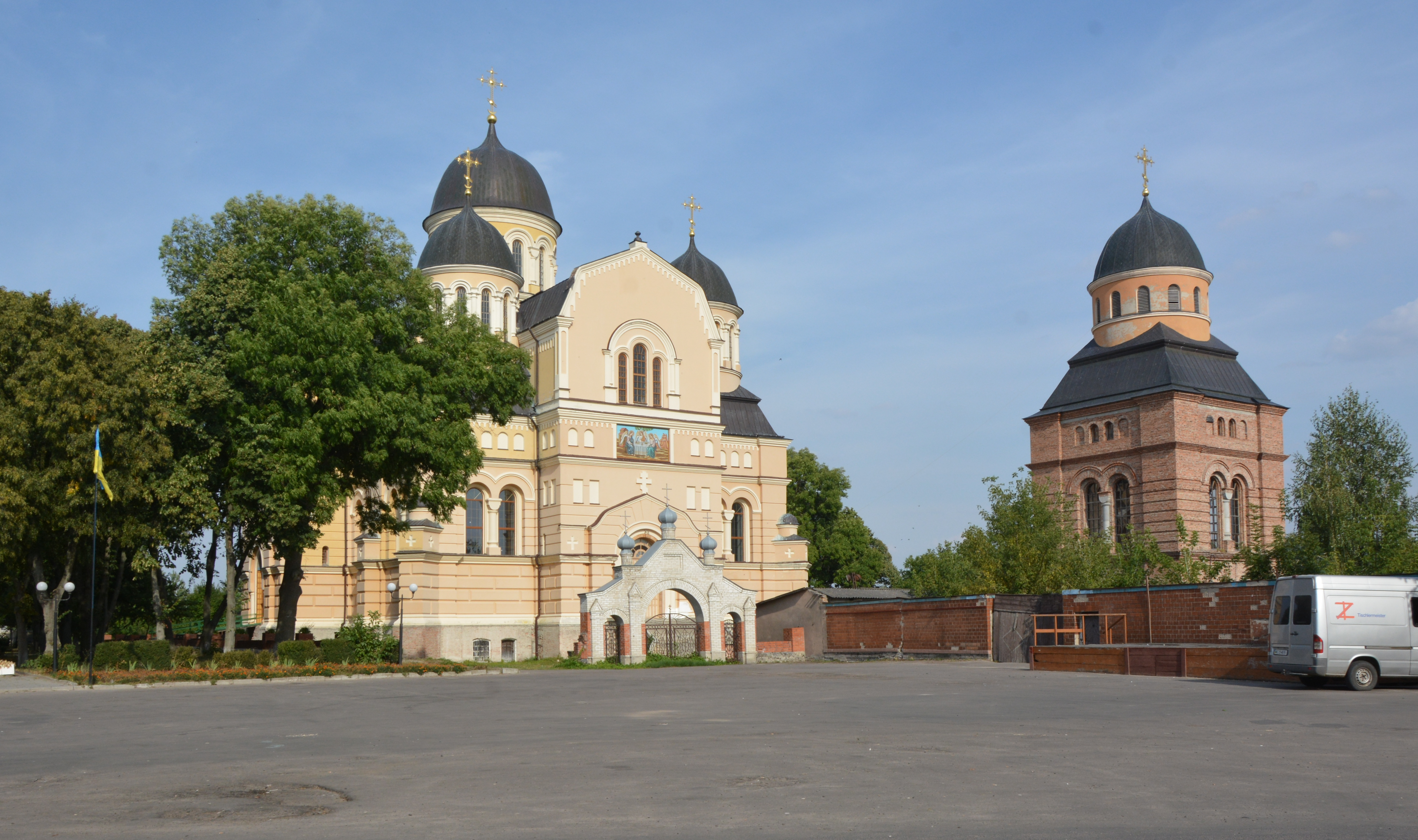 Троїцька церква (мур.), Берестечко